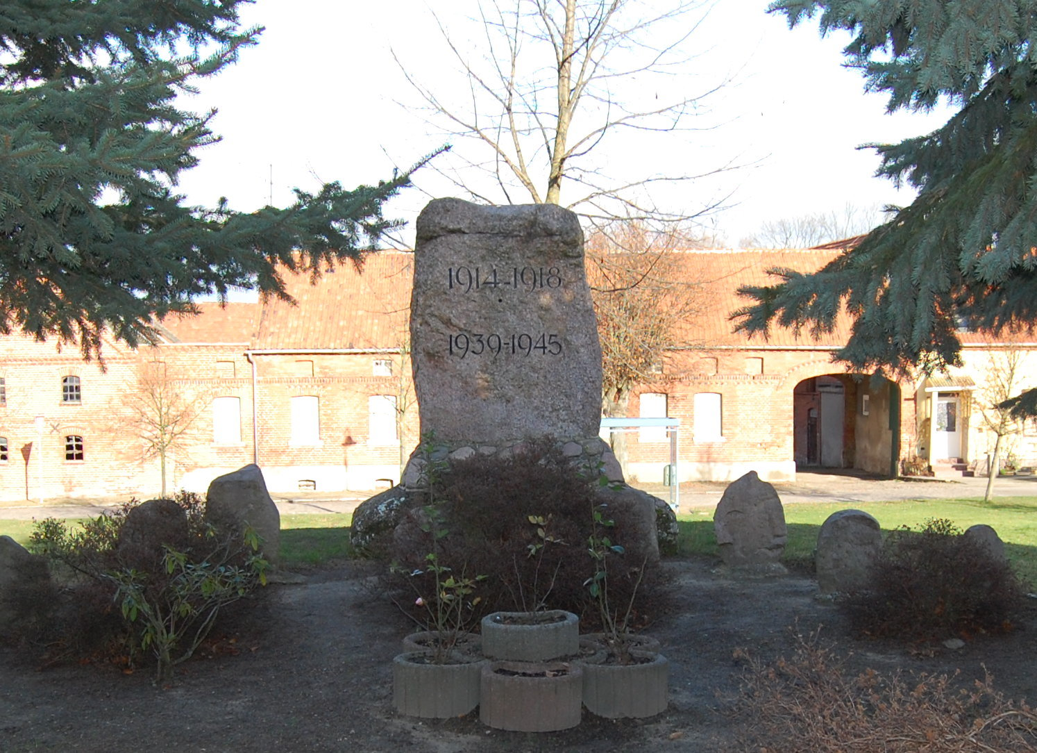 Kriegerdenkmal in Heeren, Altmark